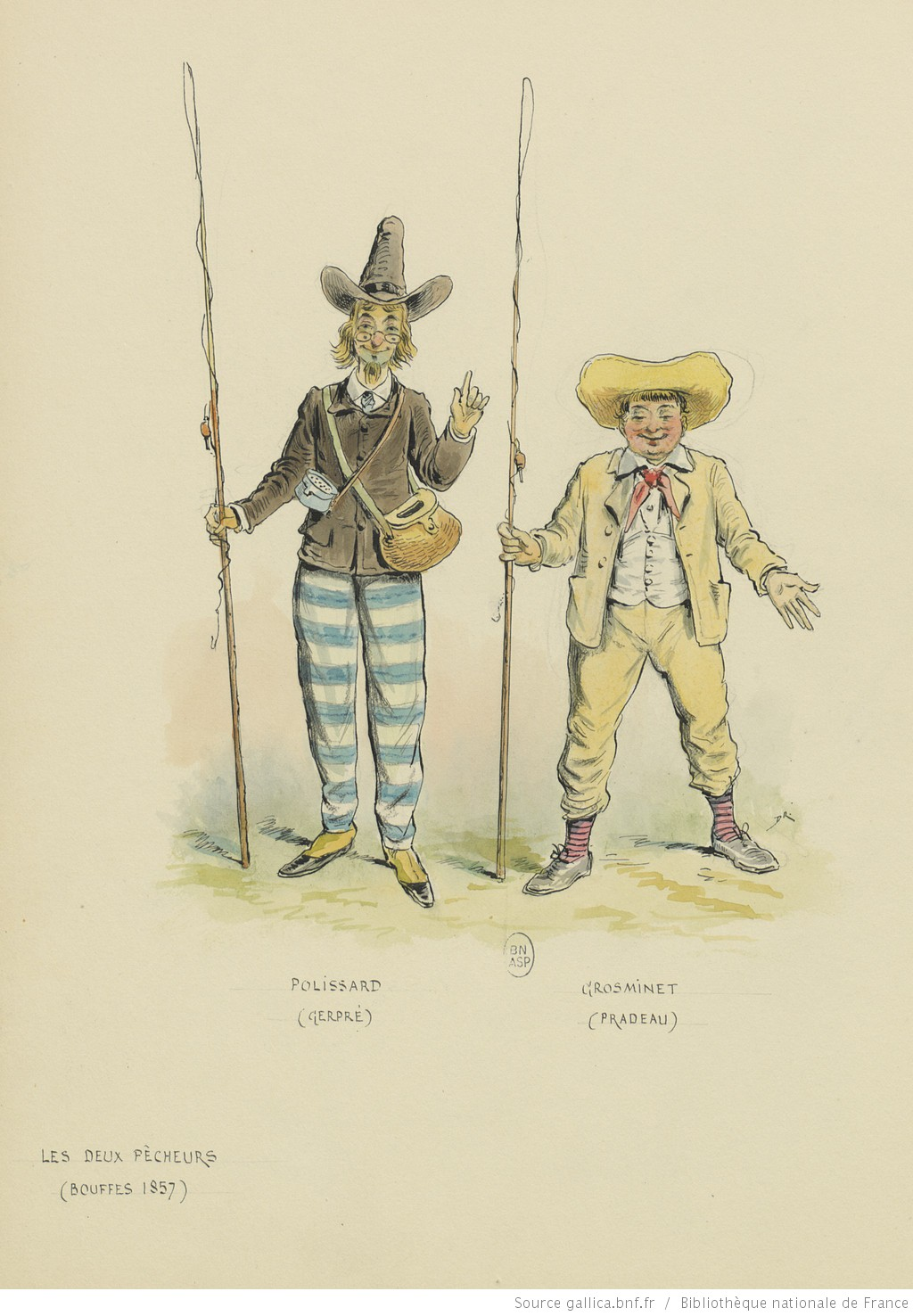 [Les deux pêcheurs, bouffonnerie musicale : Gerpré (Polissard) et Pradeau (grosminet) : dessin / de Draner]